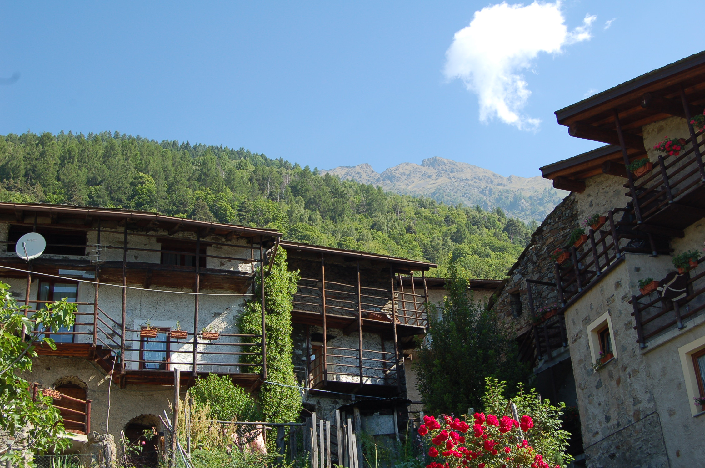 Scio contrada Case Alte in Baruffini Frazione di Tirano Prov, Sondrio